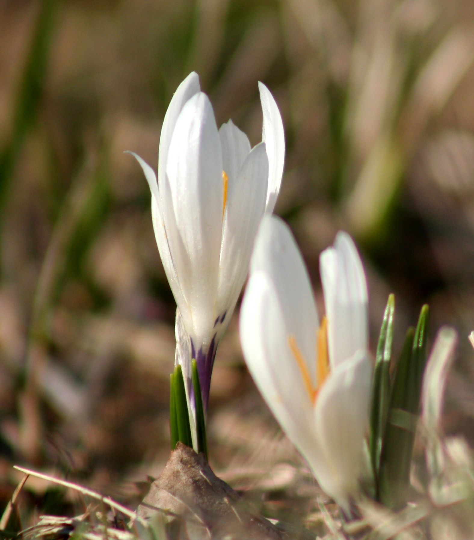 Crocus_albiflorus (Zafferano alpino) Localita: Pian di Coltura, Lentiai (BL), 800 m s.l.m.